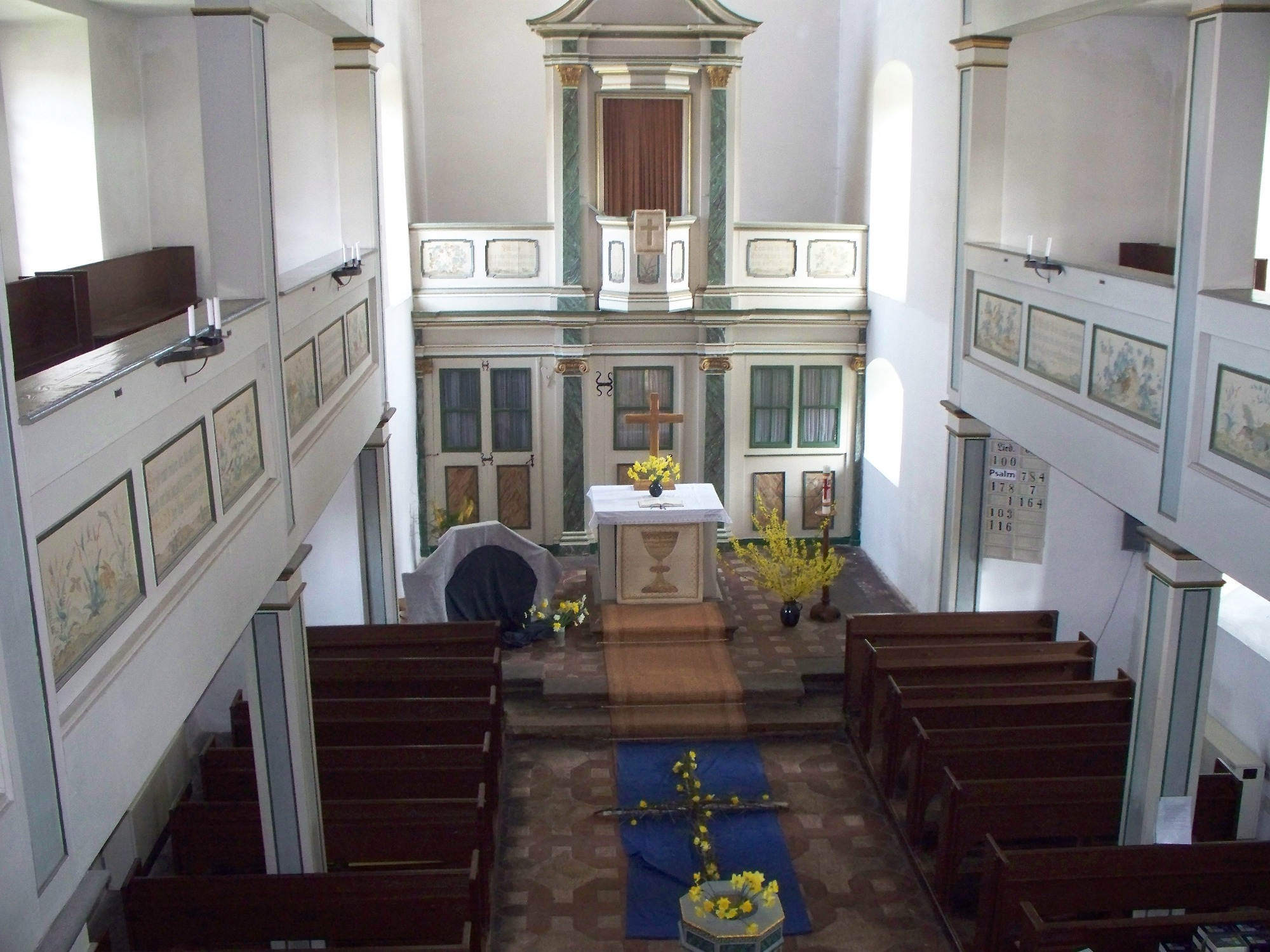 Kirche im alten Ortsteil von Winzerla; Innenansicht